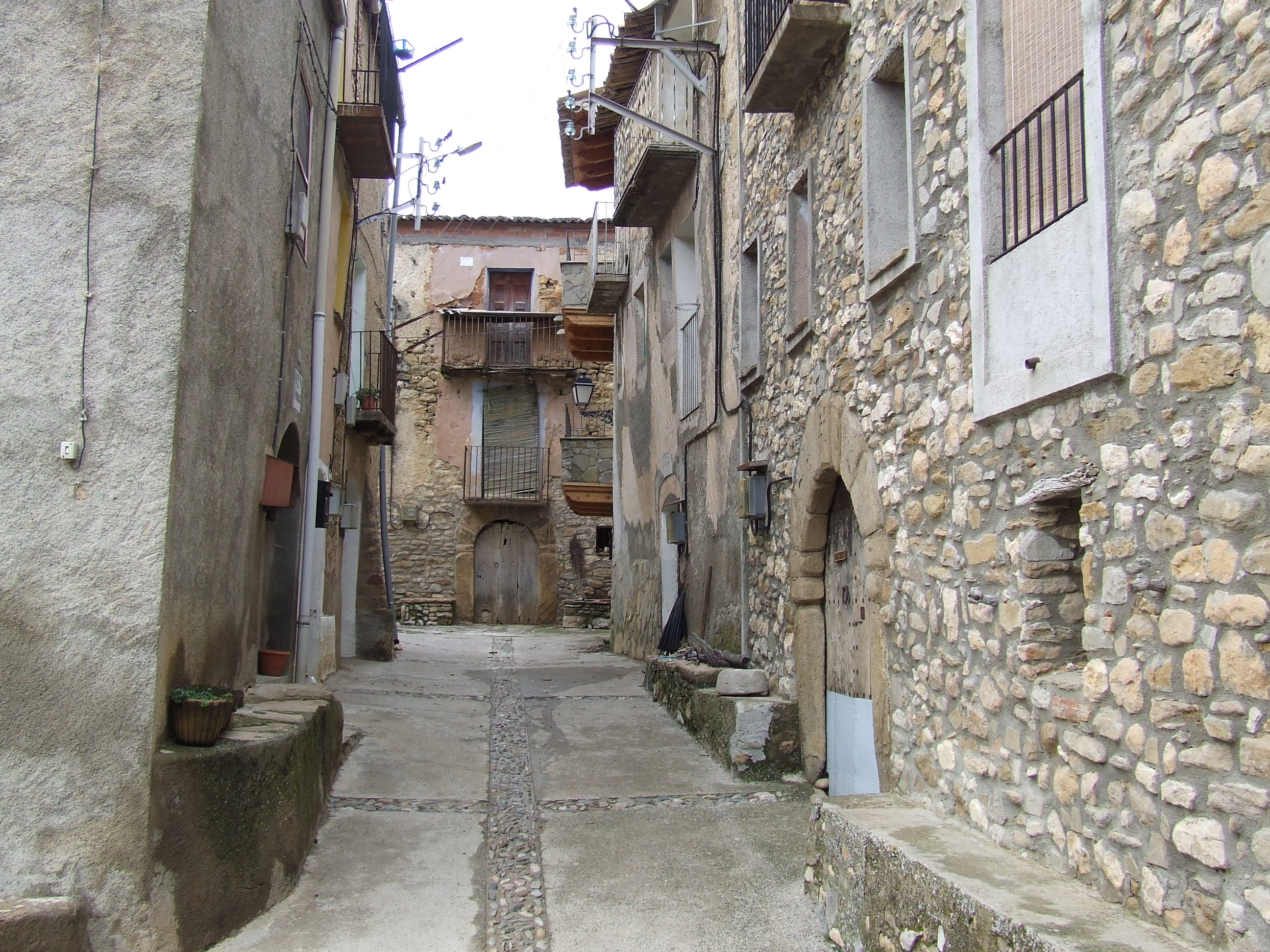 Carrer de Sant Esteve de la Sarga (Pallars Jussà)